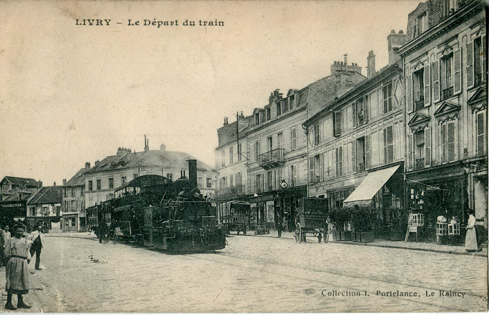 Carte postale ancienne éditée par Portelance au RaincyLIVRY : Le départ du train